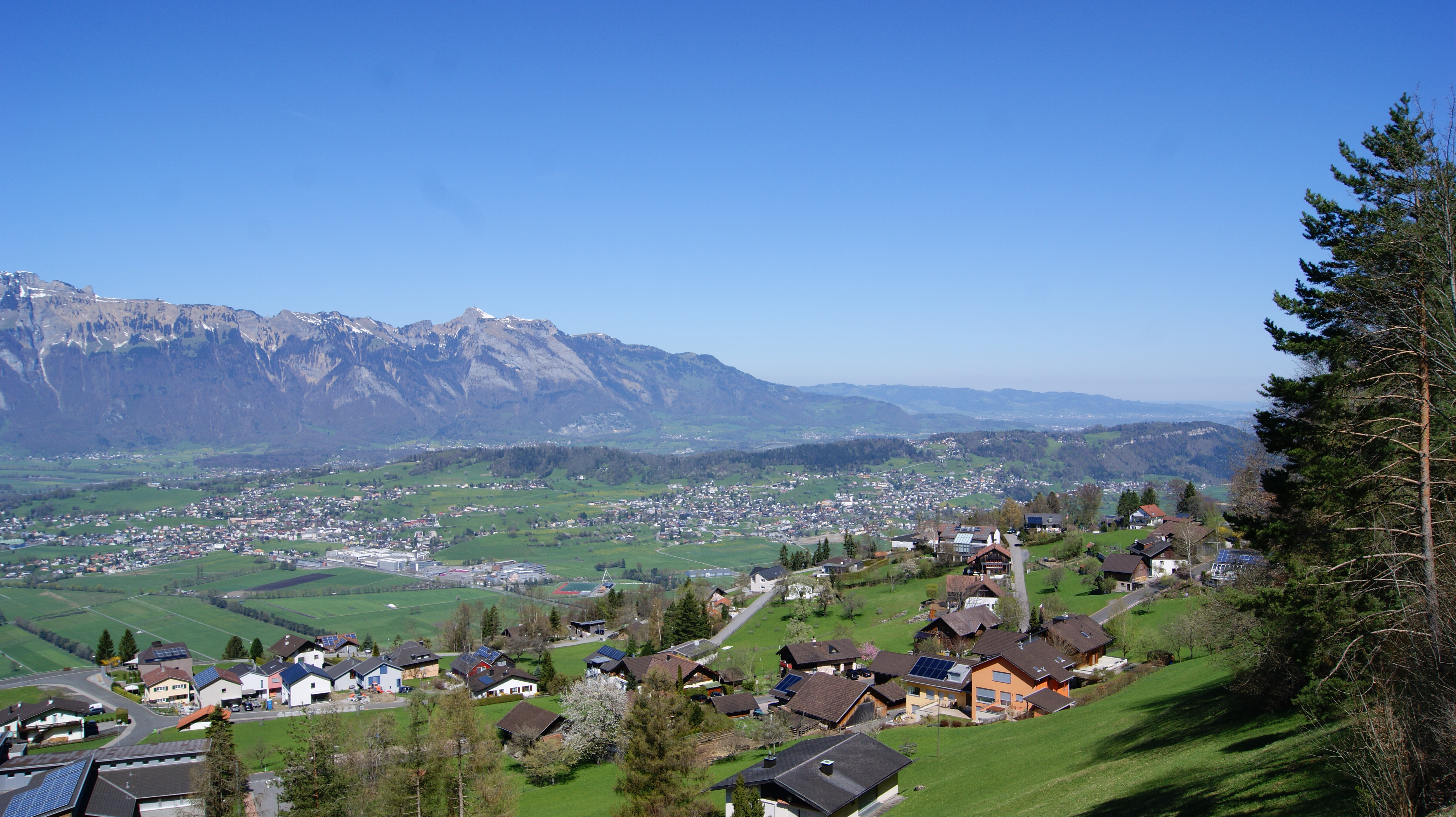 Blick über Planken (Liechtenstein) in die Schweiz. Unten das Alpenrheintal mit Mauren und Schellenberg (links Eschen und dahinter Gamprin-Bendern). Ganz rechts Feldkirch (Österreich).